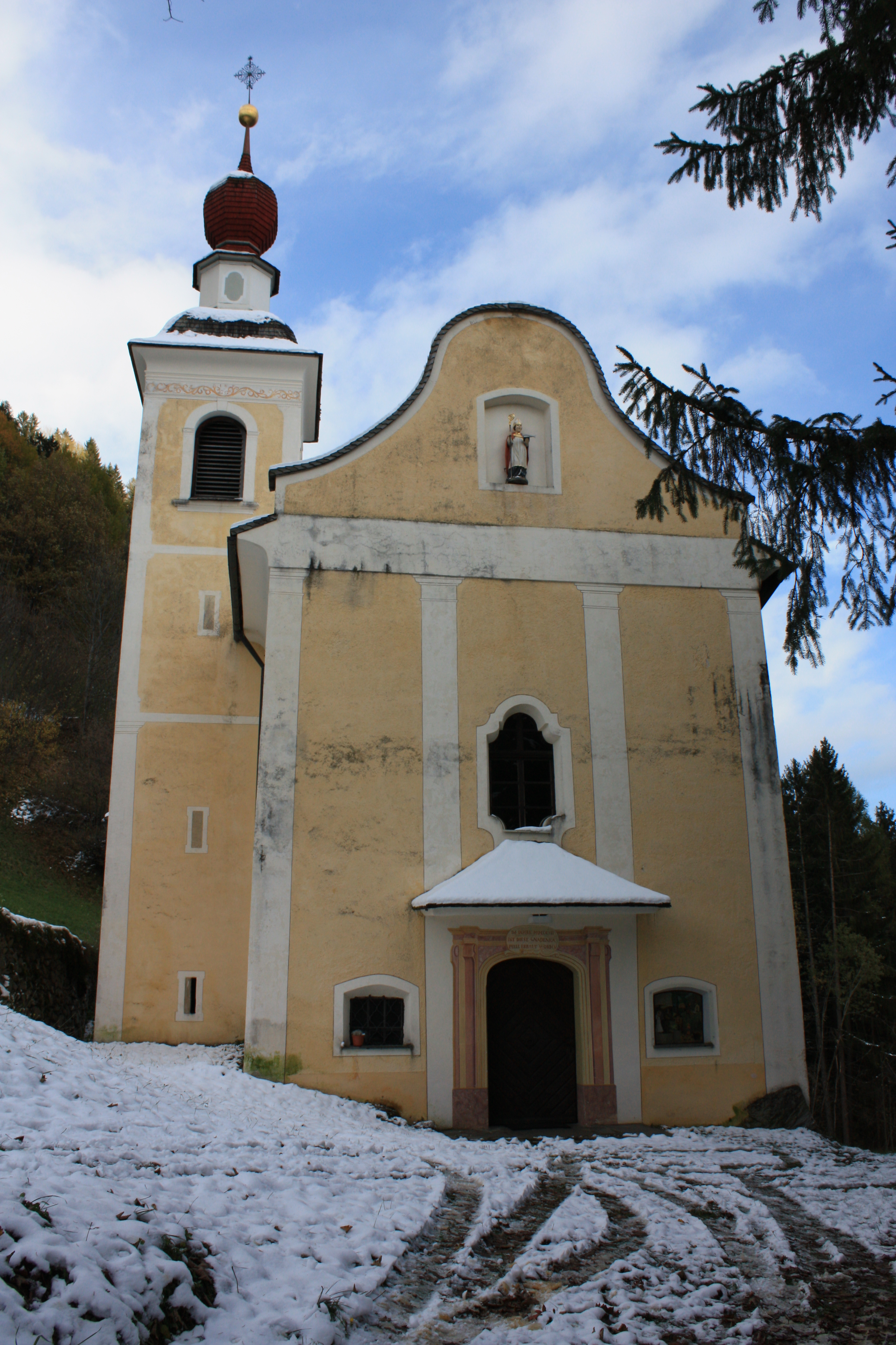 Kath. Filialkirche Maria-Heimsuchung